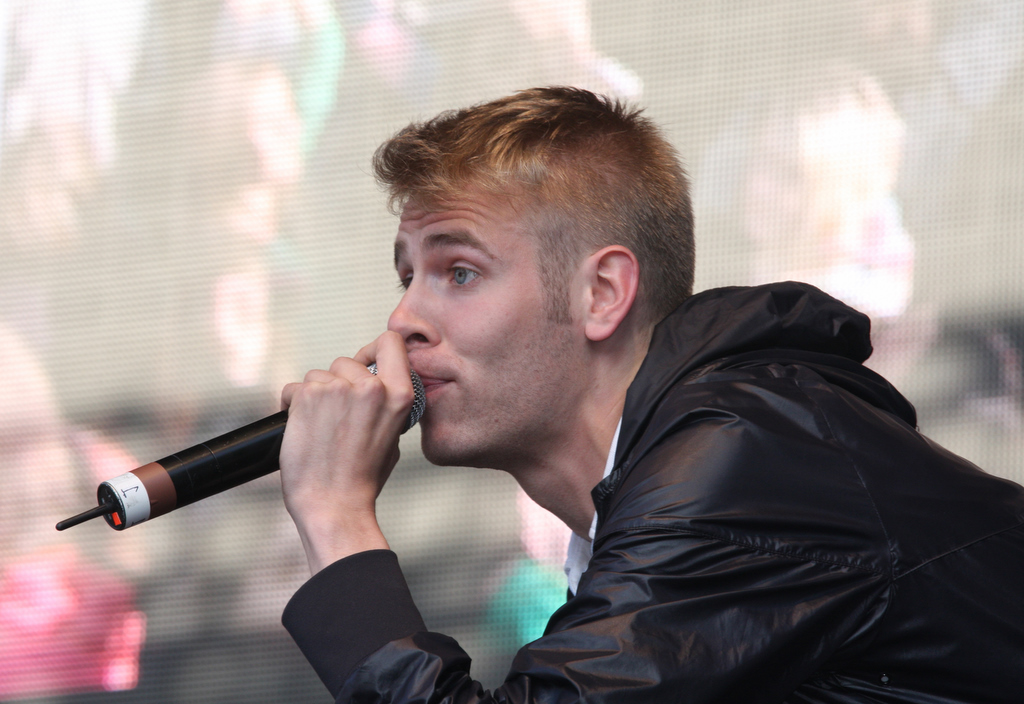 Lars Vaular in Stavanger 2010